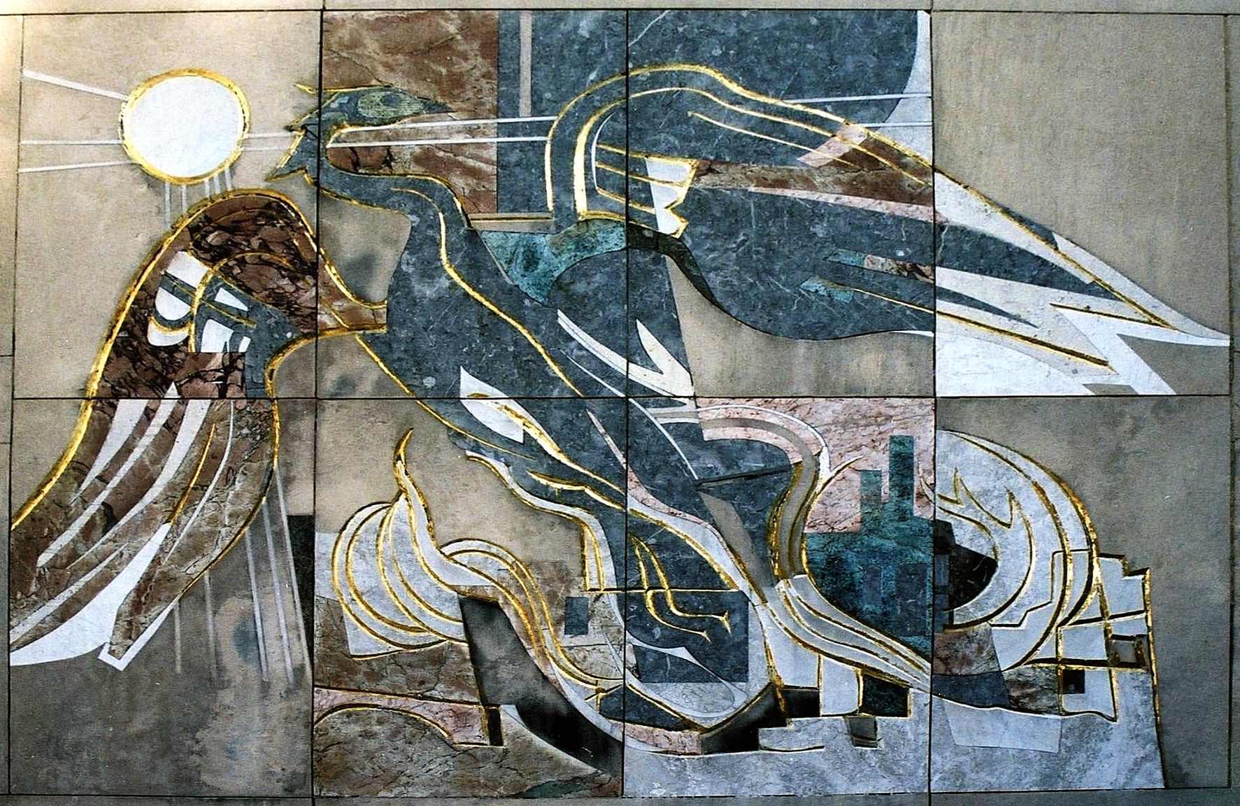 Das Kunstwerk erinnert an den Wiederaufbau Braunschweigs nach dem Zweiten Weltkrieg.